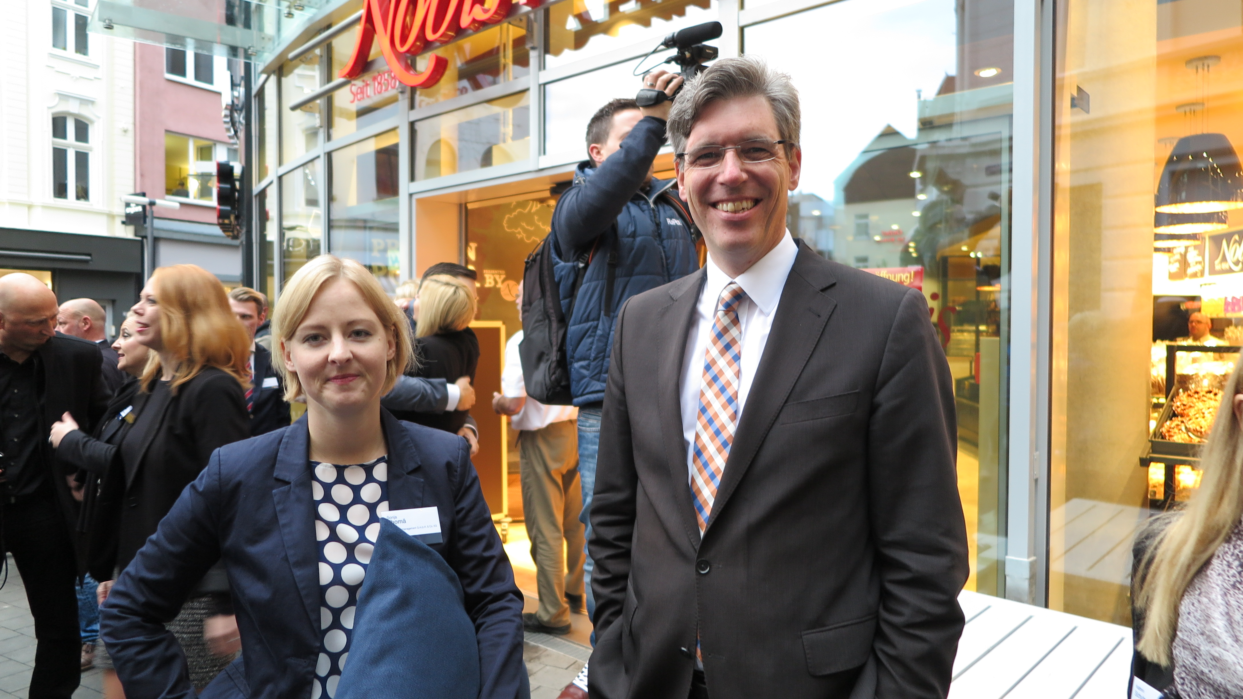 Der Aachener Oberbürgermeister Marcel Philipp nach der Eröffnung der Aquis Plaza mit einer Mitarbeiterin des Einkaufszentrums.